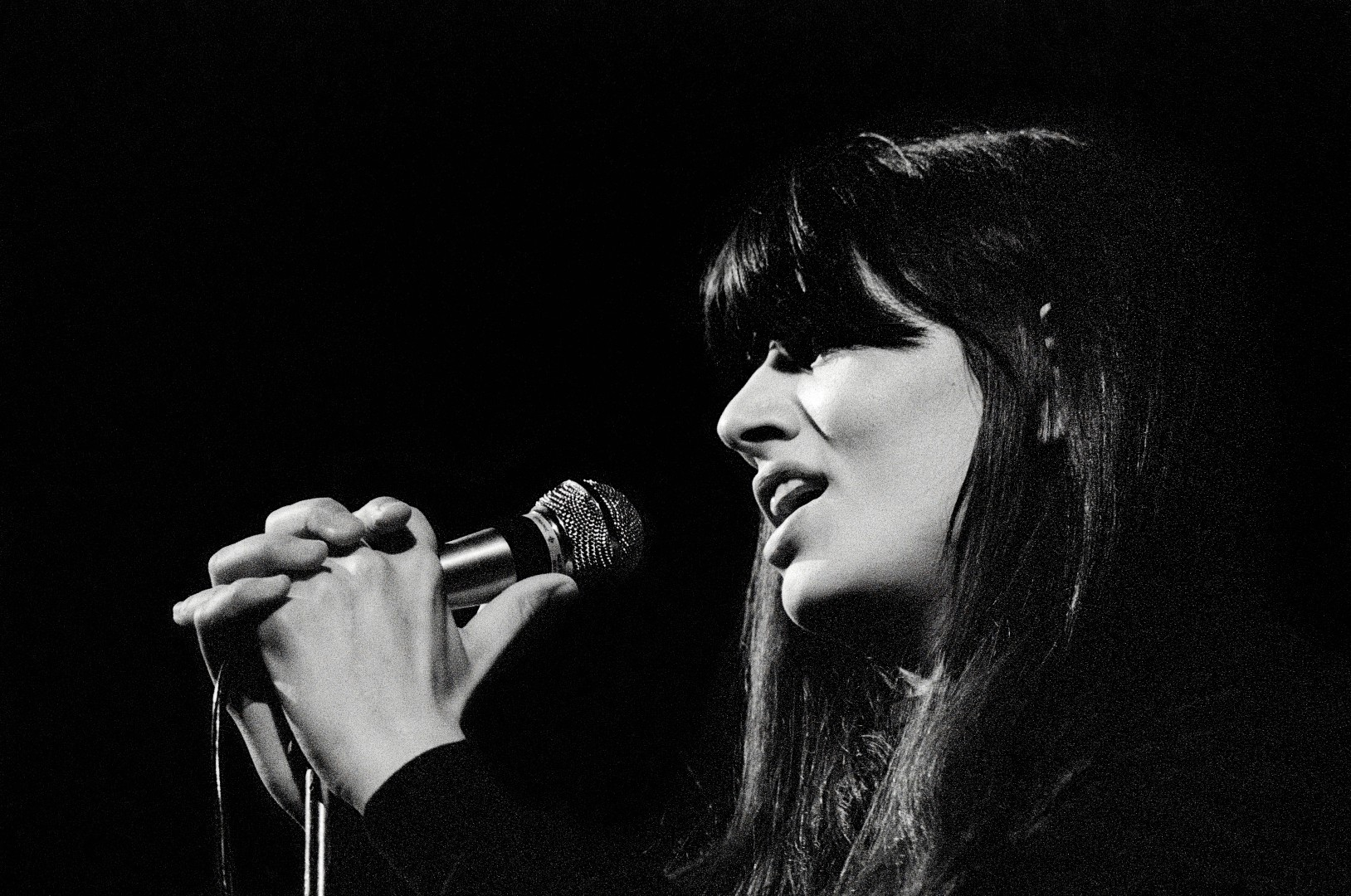 Catherine Ribeiro, Bordeaux 1972, SIGMA Chanson